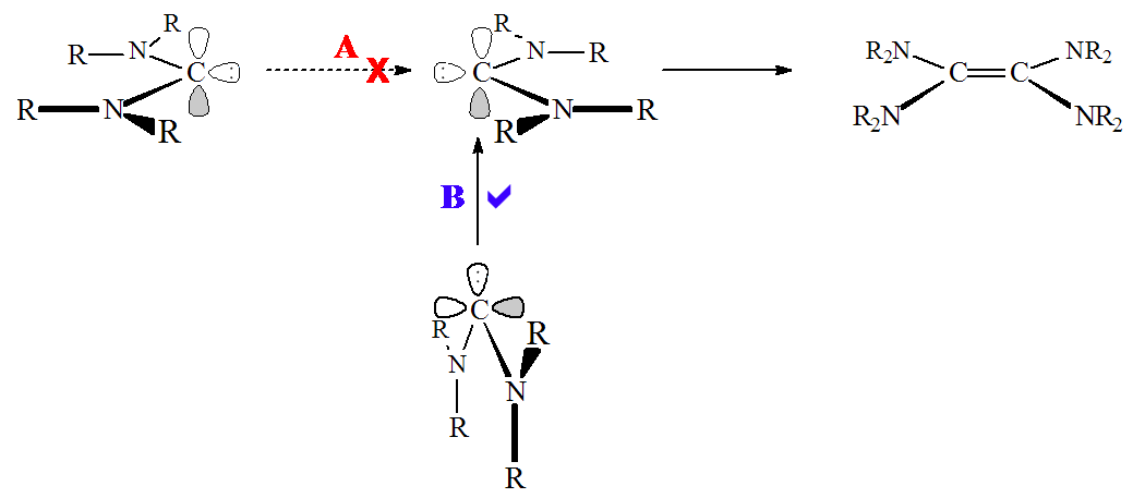 Diaminocarbene dimer